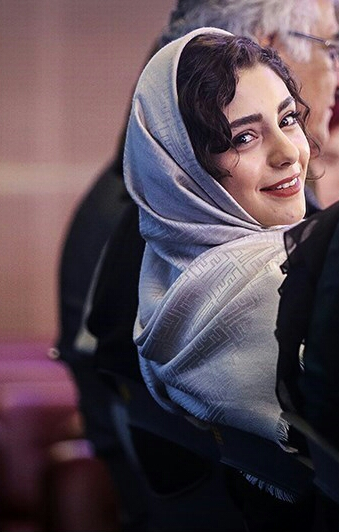 هستی مهدی‌فر - بهمن ۱۳۹۵